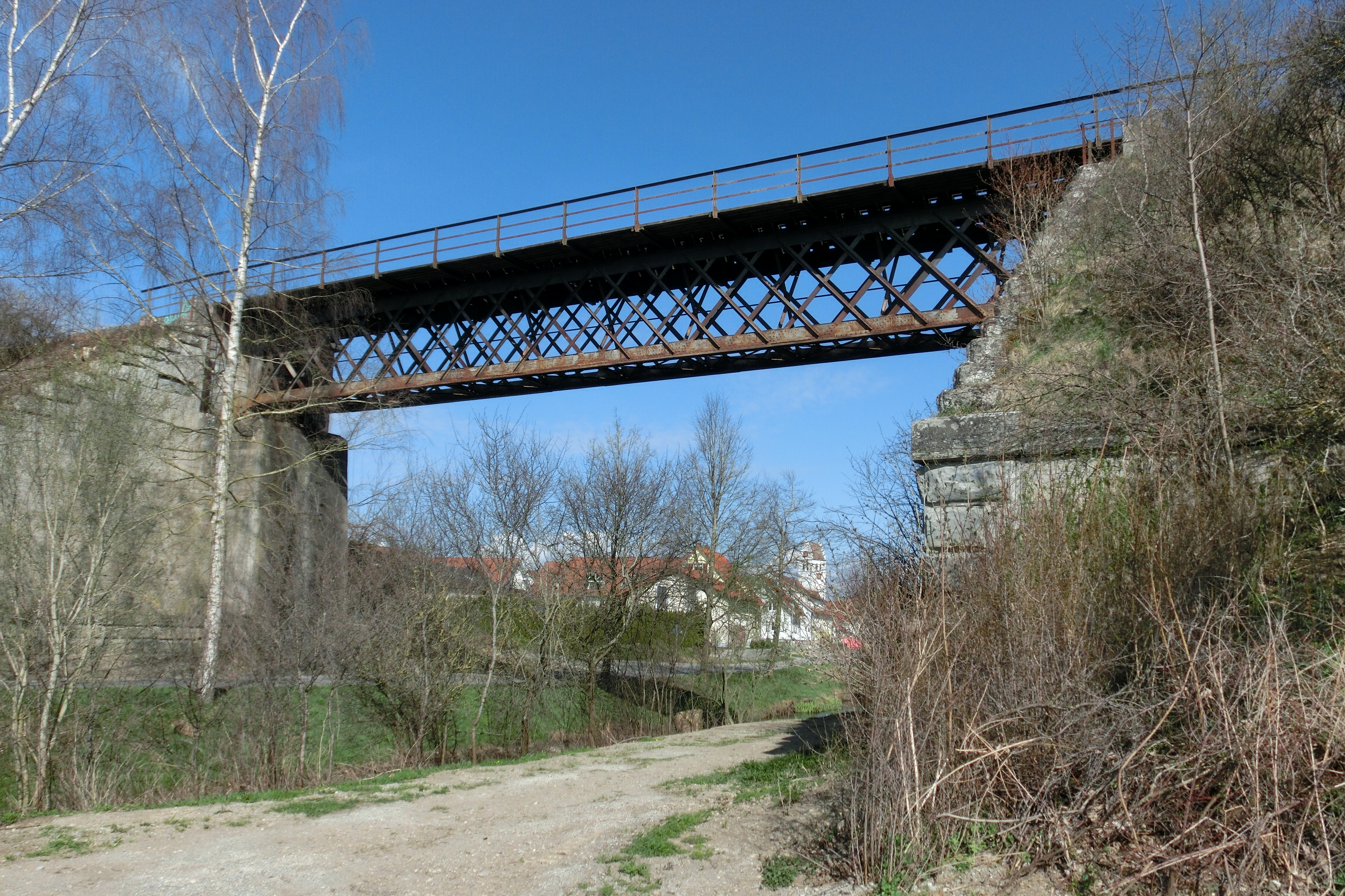 Deutschland - Baden-Württemberg - Landkreis Sigmaringen - Ostrach: Gitterbrücke führt die Bahnstrecke Altshausen–Schwackenreute über die Ostrach